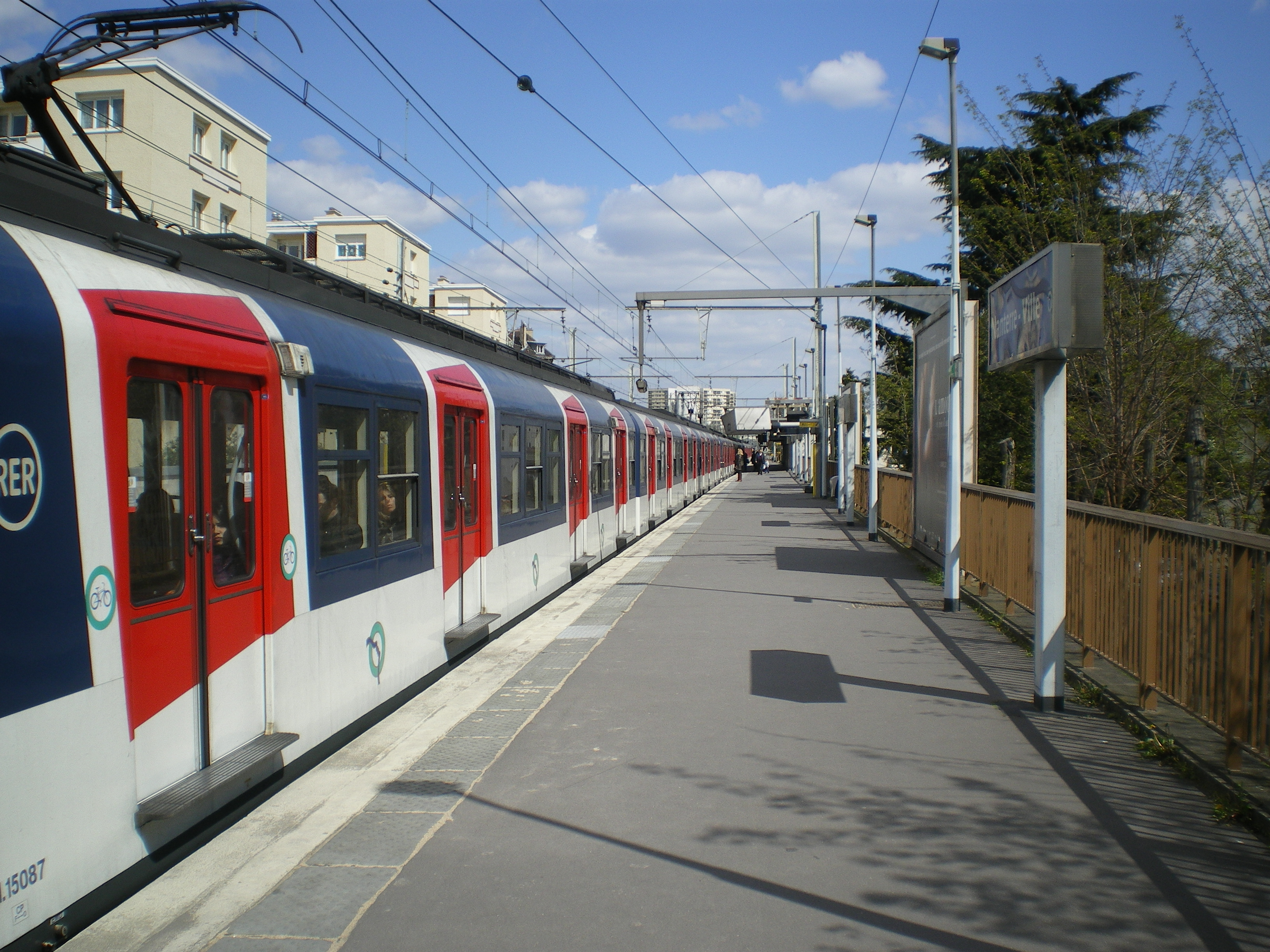 Quai en direction de Saint Germain en Laye du RER A a NAnterre Ville